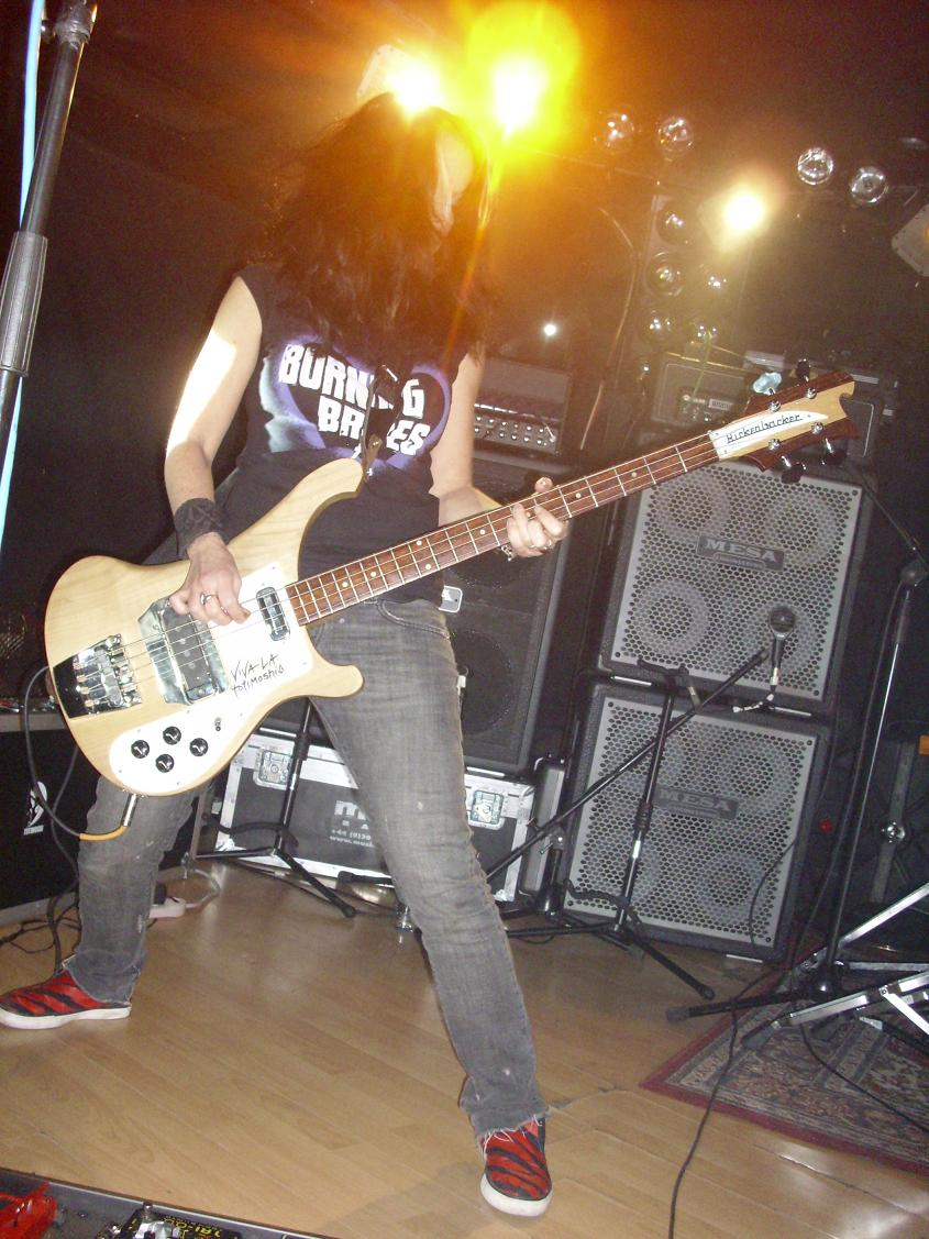 Sala Live Madrid , 6 Febrero 2009